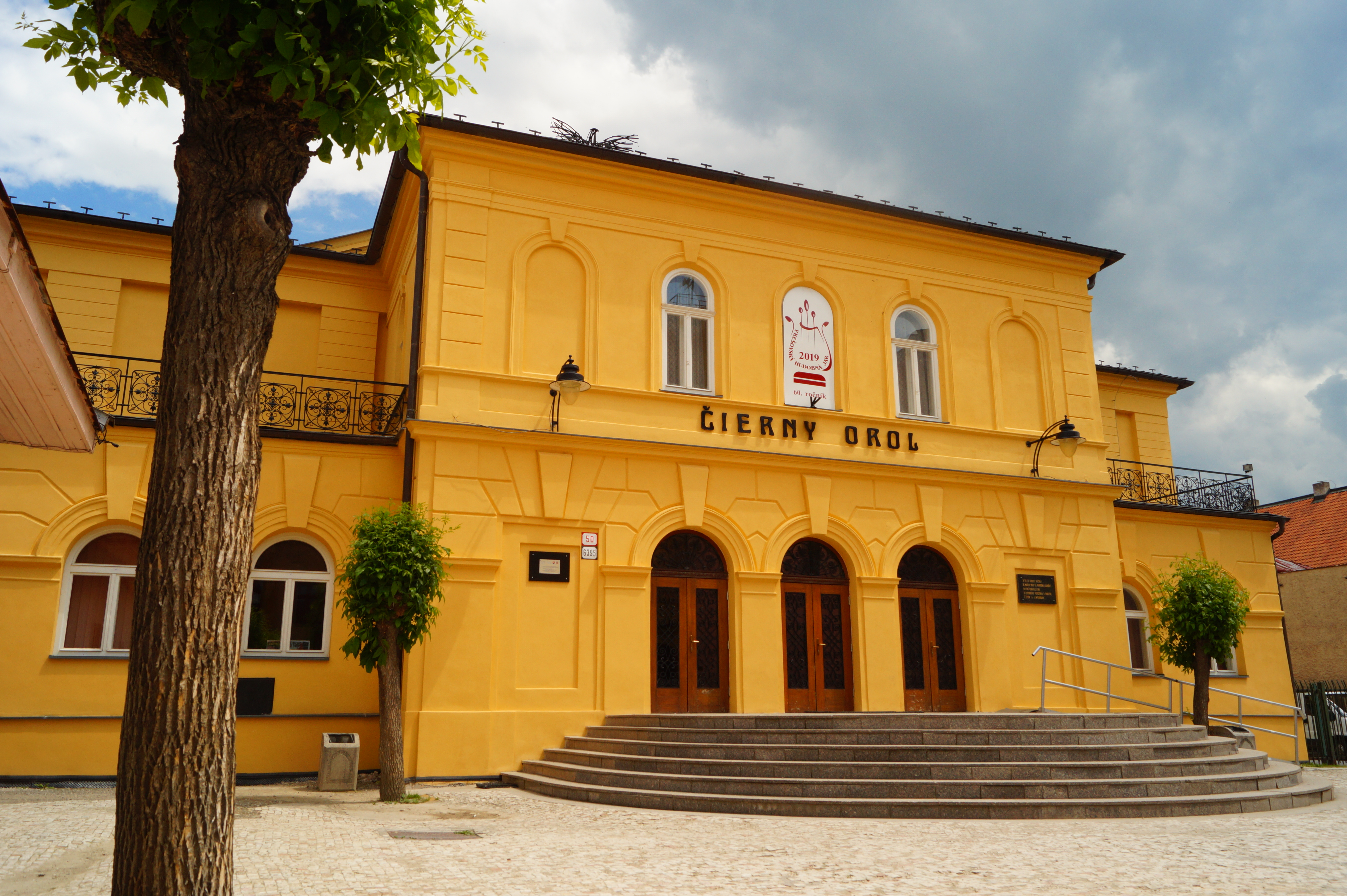 PKO Čierny orol, Prešov - Staré mesto